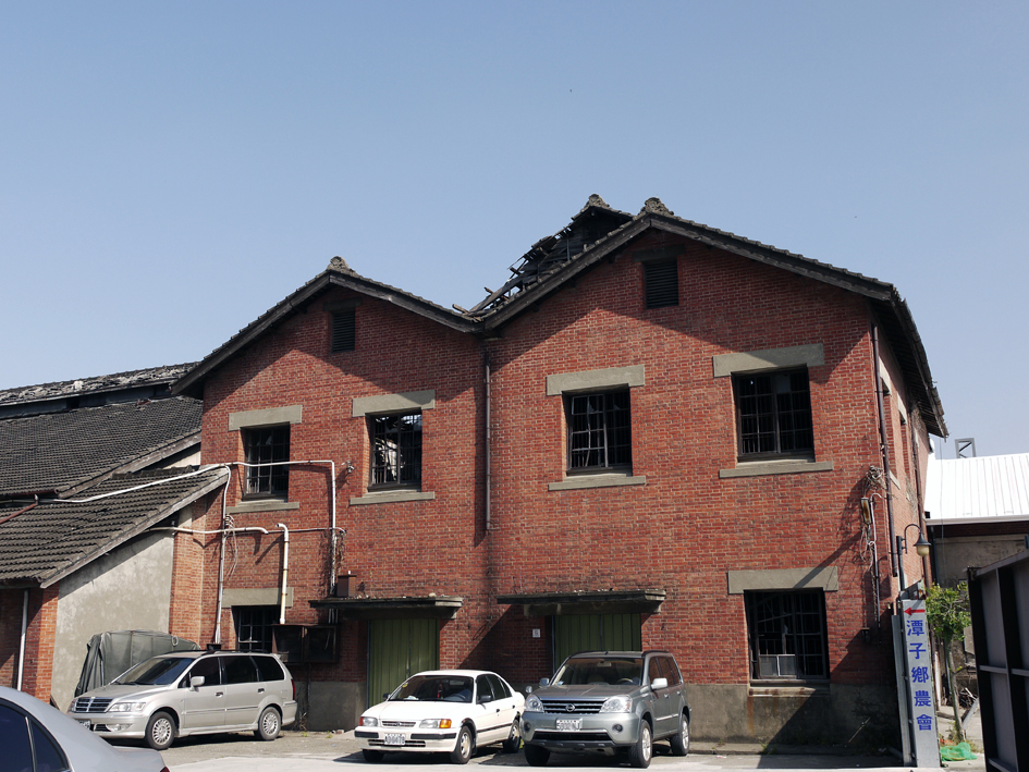 中文（台灣）: 臺中市潭子區農會穀倉。